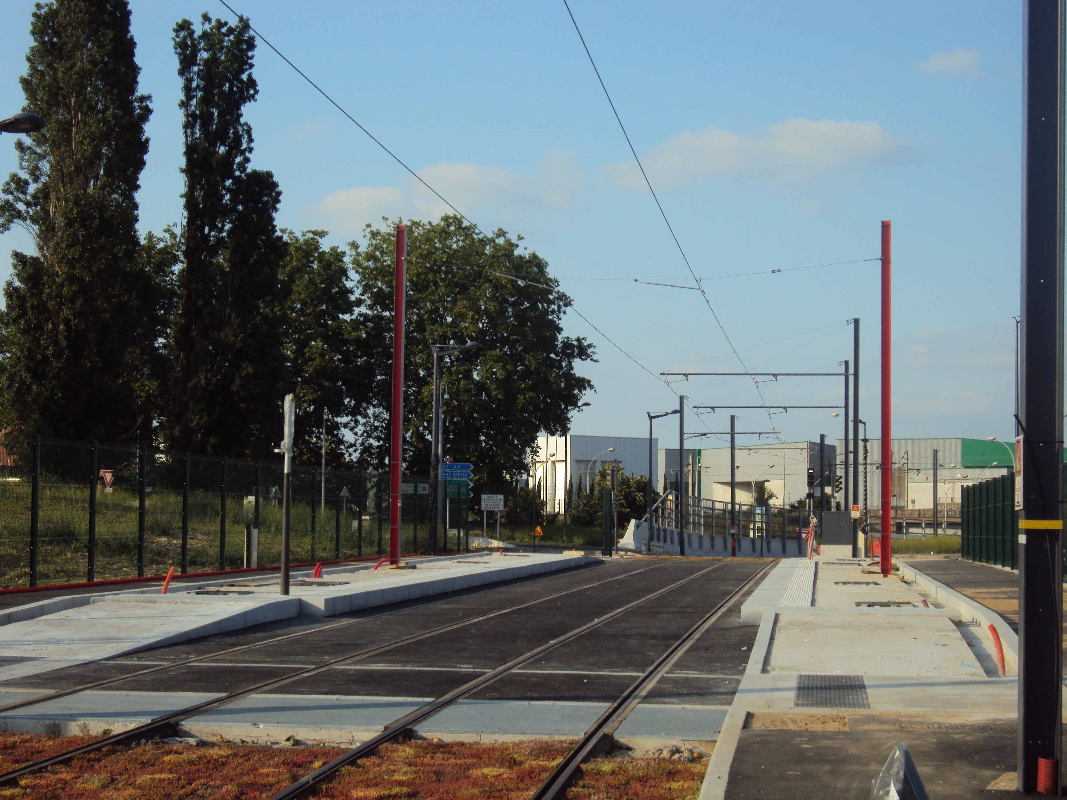 Travaux T7 au MIN